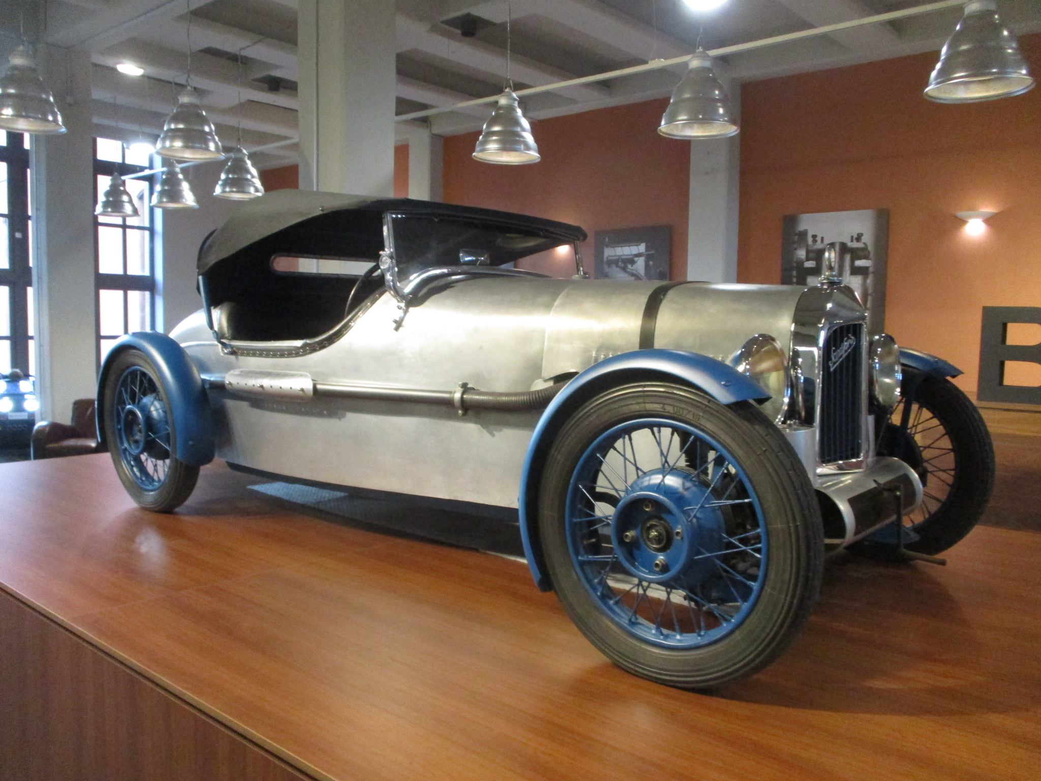 Sandford cyclecar - Collection Schlumpf - Cité de l'automobile de Mulhouse en Alsace